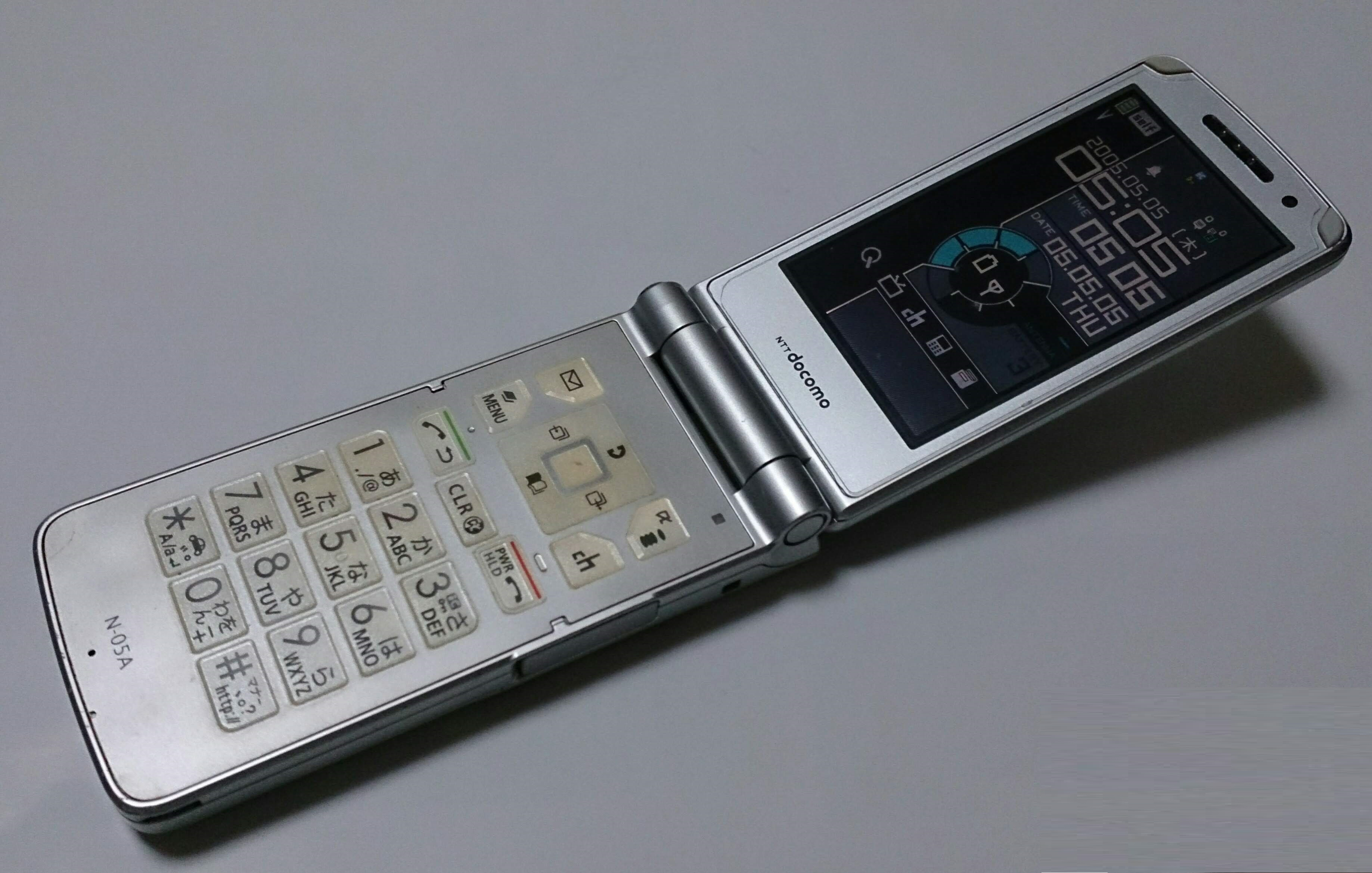 N-05A